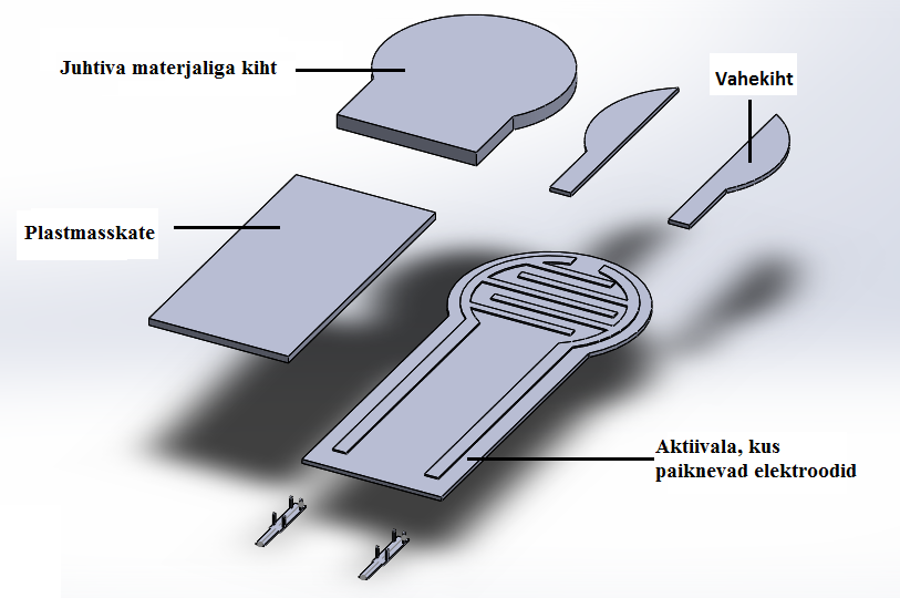 takistusliku rohuanduri näidis